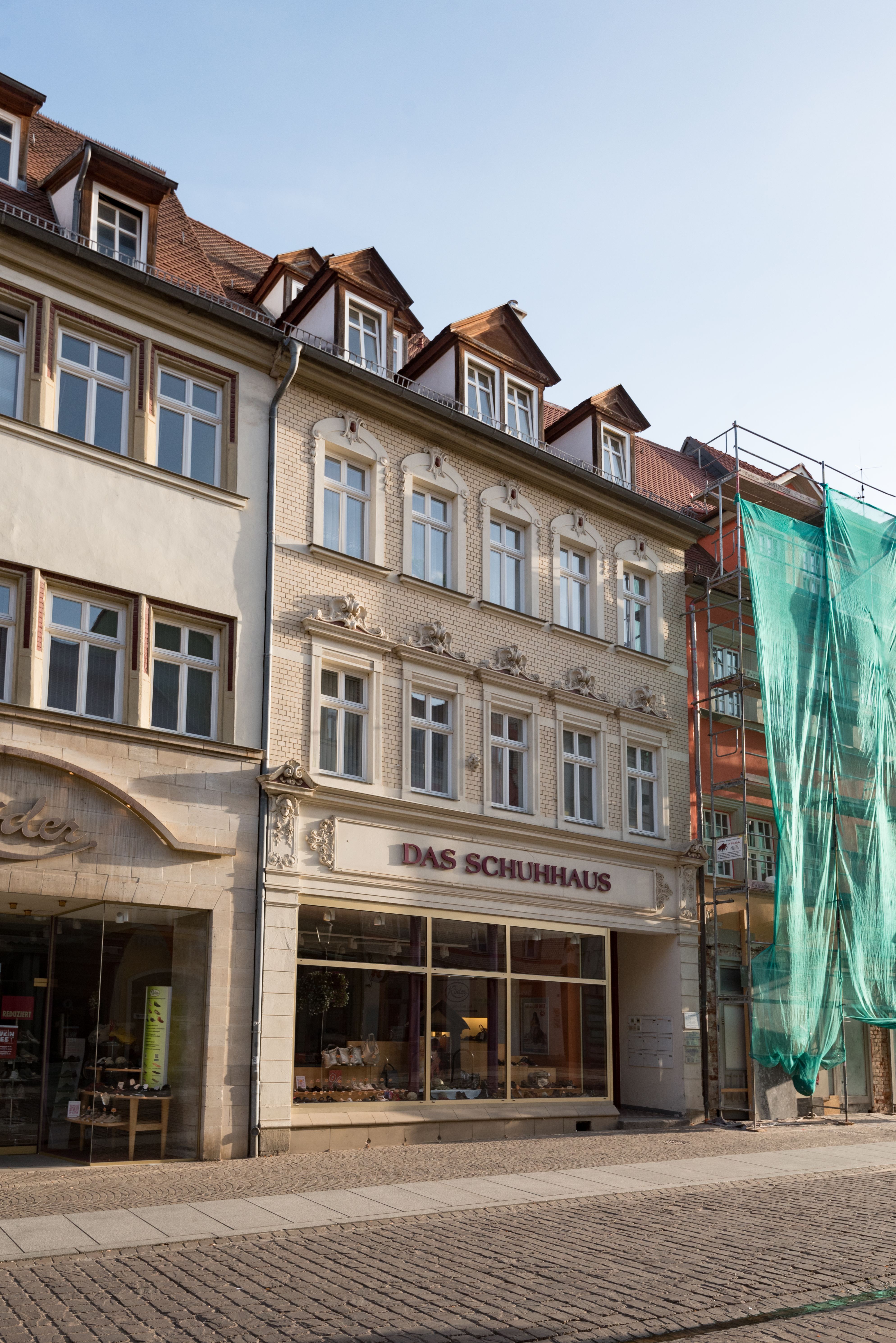 Naumburg (Saale), Jakobstraße 5